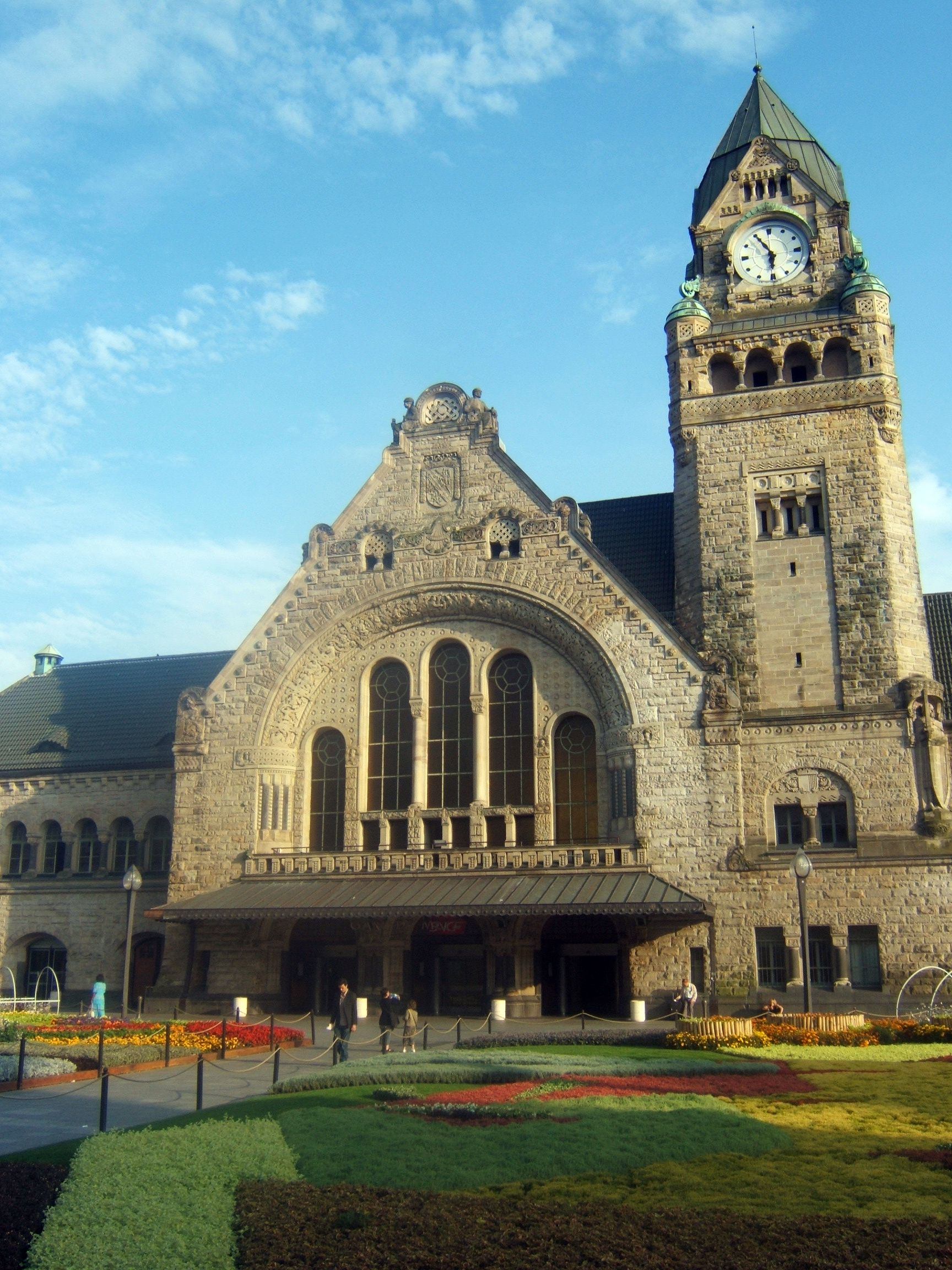 Gare de Metz / Metz train station